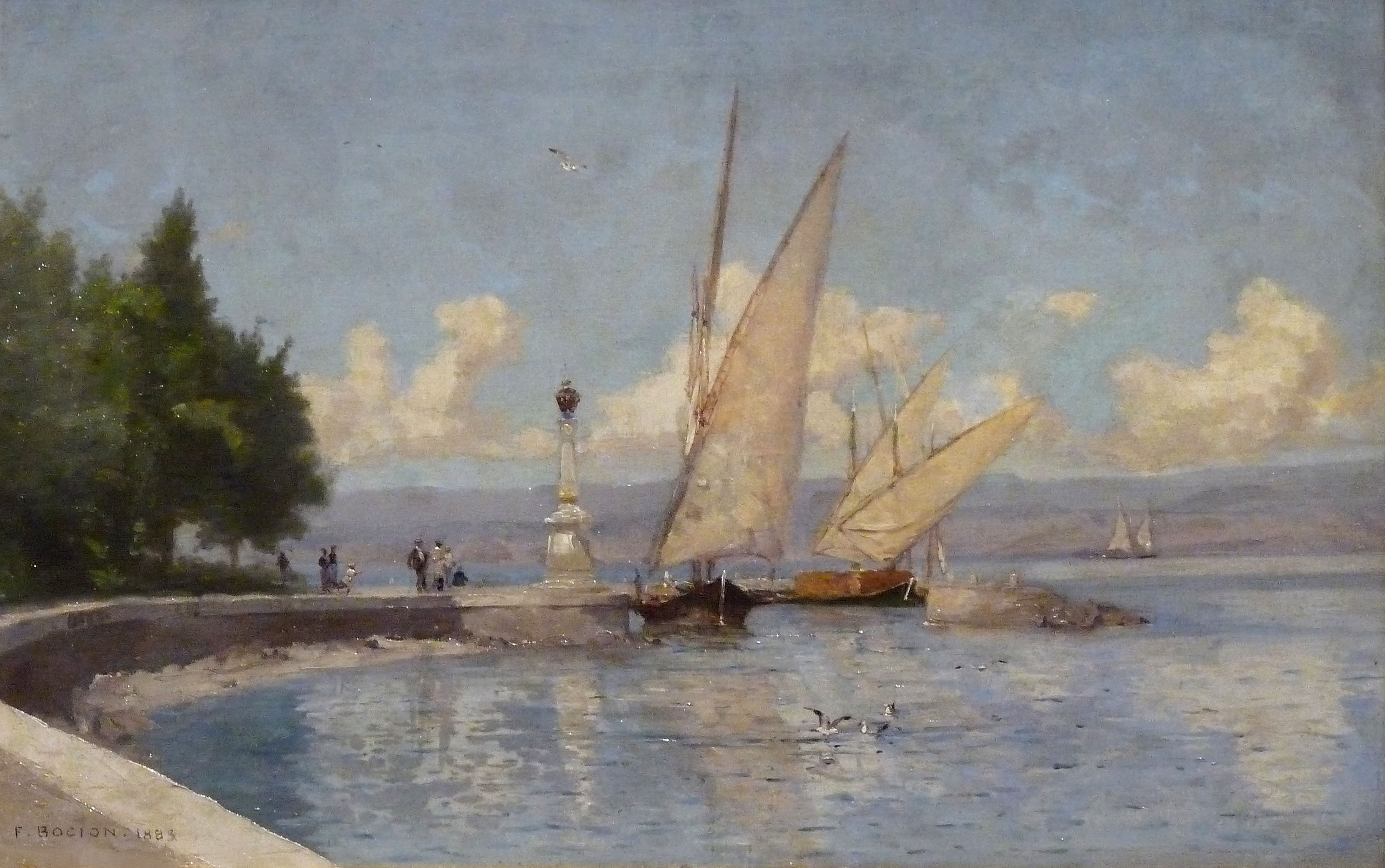 François-Louis David Bocion, Le Lac Léman ou Près d'Evian au lac de Genève, huile sur toile, Musée des beaux-arts de Strasbourg